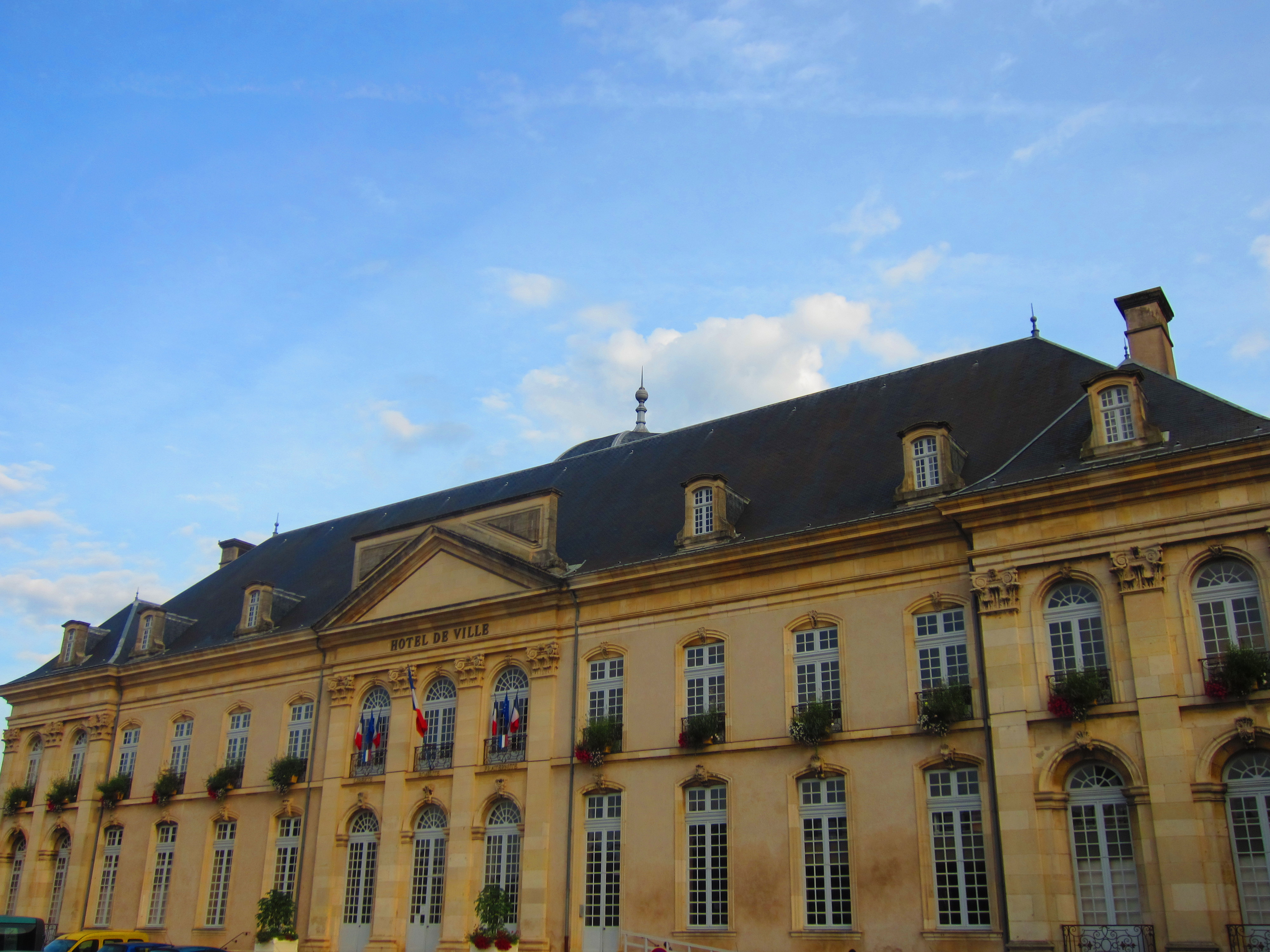 Toul Mairie